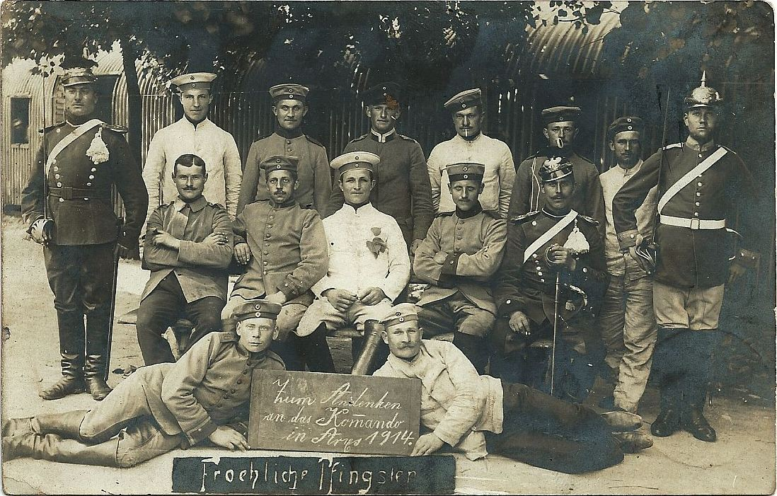 Abschluss der letzten Truppenübung der I. Division in Königsberg auf dem Truppenübungsplatz in Arys. Die Übung lief vom 27.4 und dem 26.5.1914. Es sind vor allem Soldaten der ostpreussischen Kavallerie zu sehen. Sie gehen erleichtert in die Pfingstferien und wissen nicht, dass keine 12 Wochen später der 1. Weltkrieg beginnt. Zwischen dem 7. und 8. September 1914 müssen Teile der 1. Division den Truppenplatz im Gefecht von Arys zurückerobern. Zum Bild: Man sieht zwei Ulanen (ganz links und ganz rechts sitzend) vom Ulanen-Regiment „Graf zu Dohna“ (Ostpreußisches) Nr. 8 in Tilsit, drei Kürassiere vom Kürassier-Regiment „Graf Wrangel“ (Ostpreußisches) Nr. 3 in Königsberg, (zweiter von links stehend, dritter von links sitzend im weißen Koller und ganz rechts stehend) ein sehr vornehmes Regiment, dass noch nicht einmal den Spannring aus dem Krätzchen entfernte. Jäger vom Jäger-Regiment zu Pferde Nr. 10 in Angerburg, (zweiter von links sitzend und erster von links liegend), zwei Jäger vom Jäger-Regiment zu Pferde Nr. 9 in Insterburg (dritter von links stehend und zweiter von rechts sitzend). Dazu noch drei Soldaten im Drillich (rechts liegend, zweiter und vierter von rechts stehend) und noch Soldaten, die man nicht zuordnen kann. Der Ulane links und der Kürassier rechts nehmen Präsentationsstellung ein.